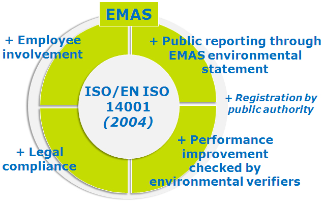 iso 14001